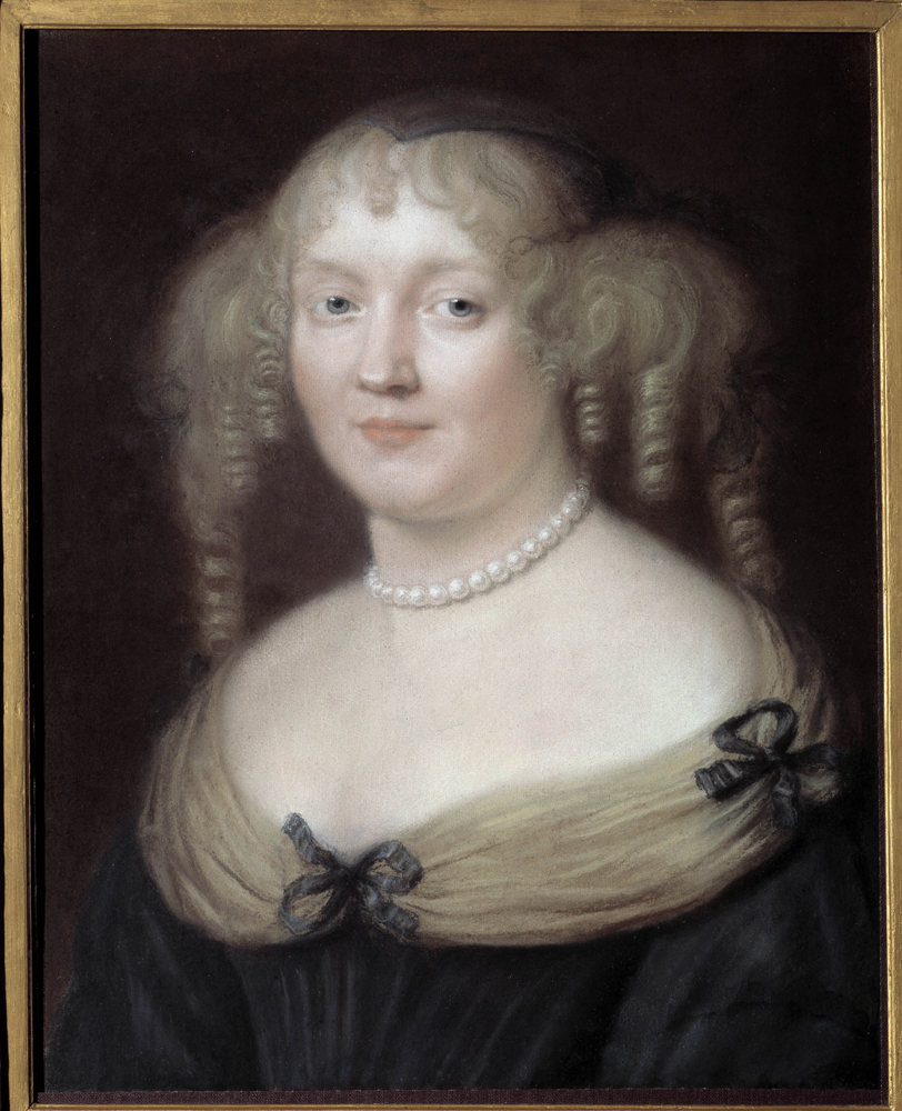 Portrait en buste. Madame de Sévigné serait coiffée à la "bouffon"